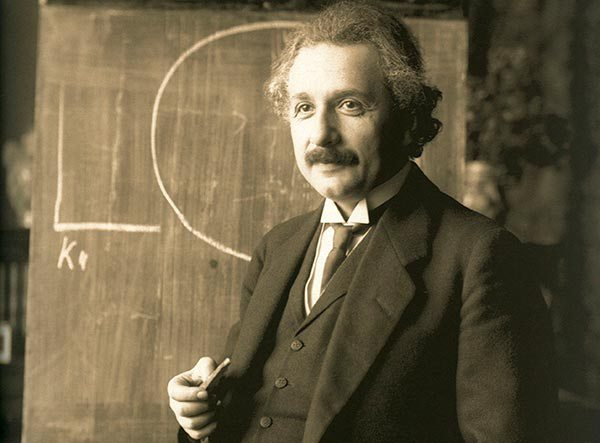 La teoría cuántica por Albert Einsteins